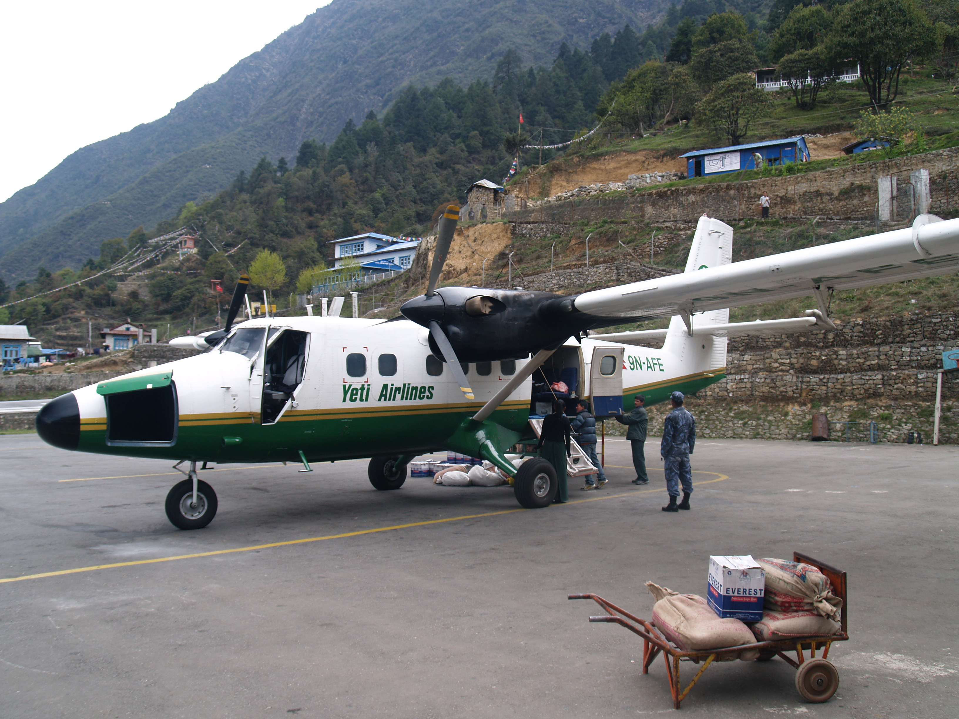 Flugzeug der Yeti Airlines